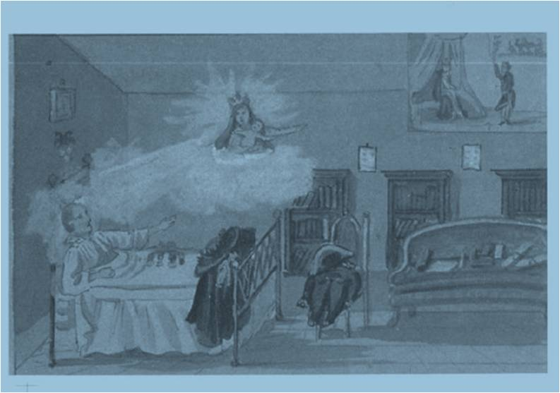 Acquerello di Giovanni Battista Quadri intitolato "Per grazia ricevuta", riferito alla notte del 22 maggio 1850